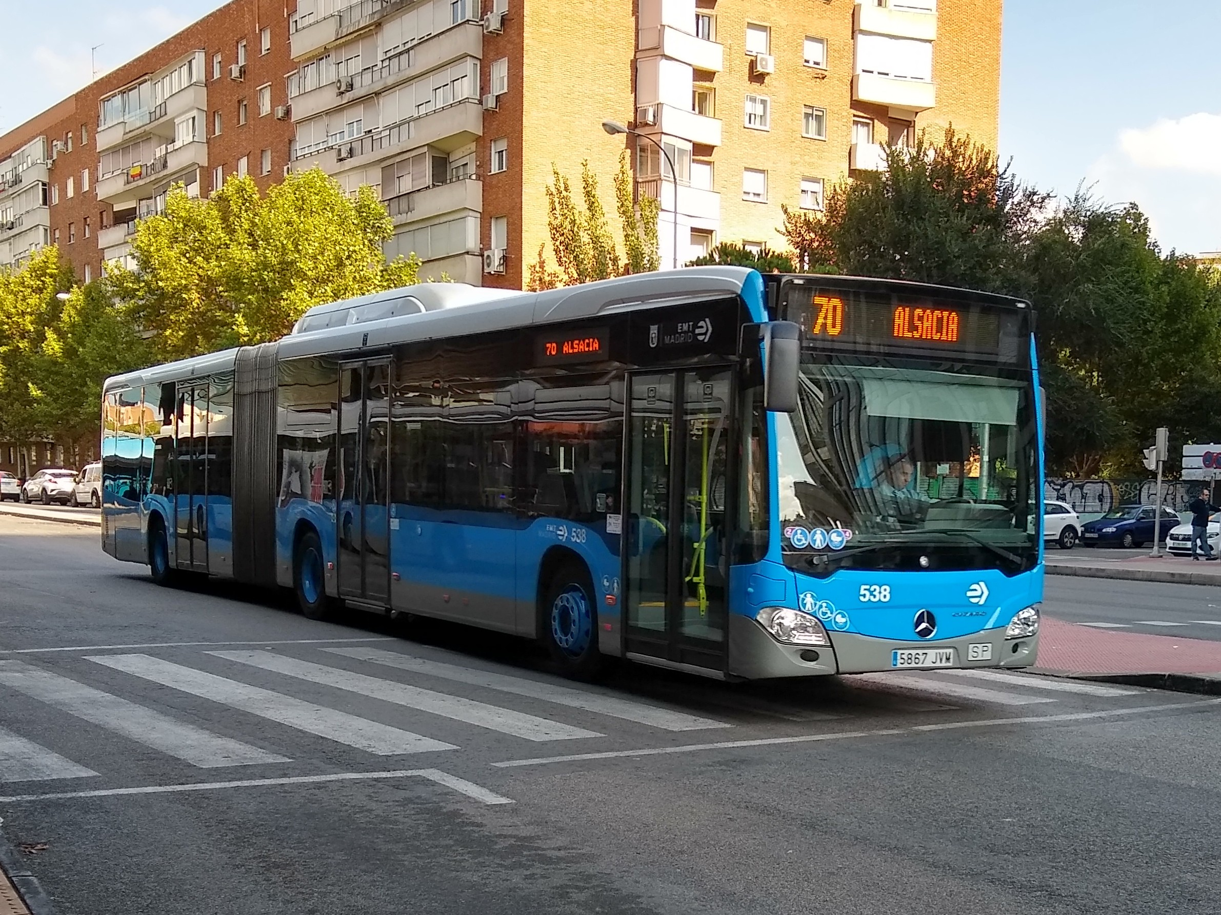 Bus de la EMT Madrid